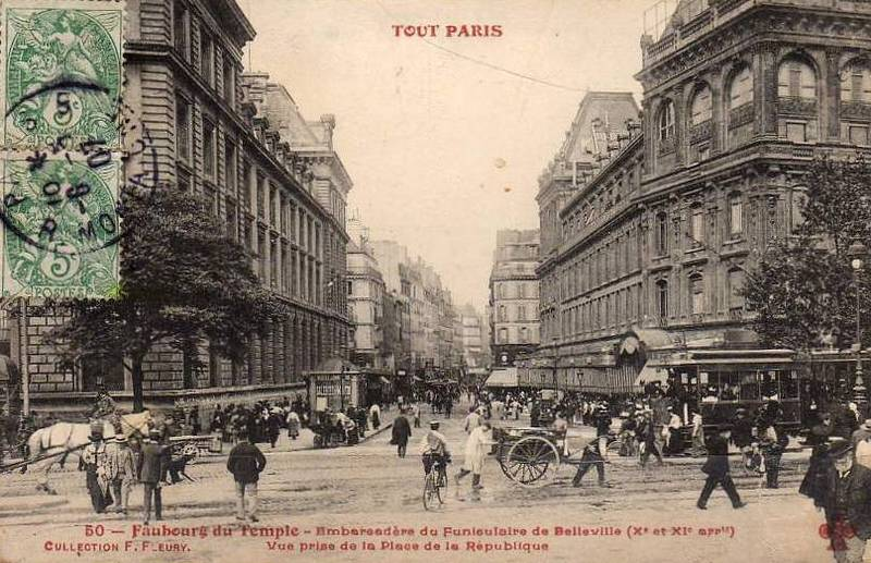 Tramway de Belleville. "Paris. Faubourg du Temple. Embarcadaire du Funiculaire [tramway] de Belleville, Xe et XIe arrondissements, vue prise de la Place de la République. Collection F.F-Eury."